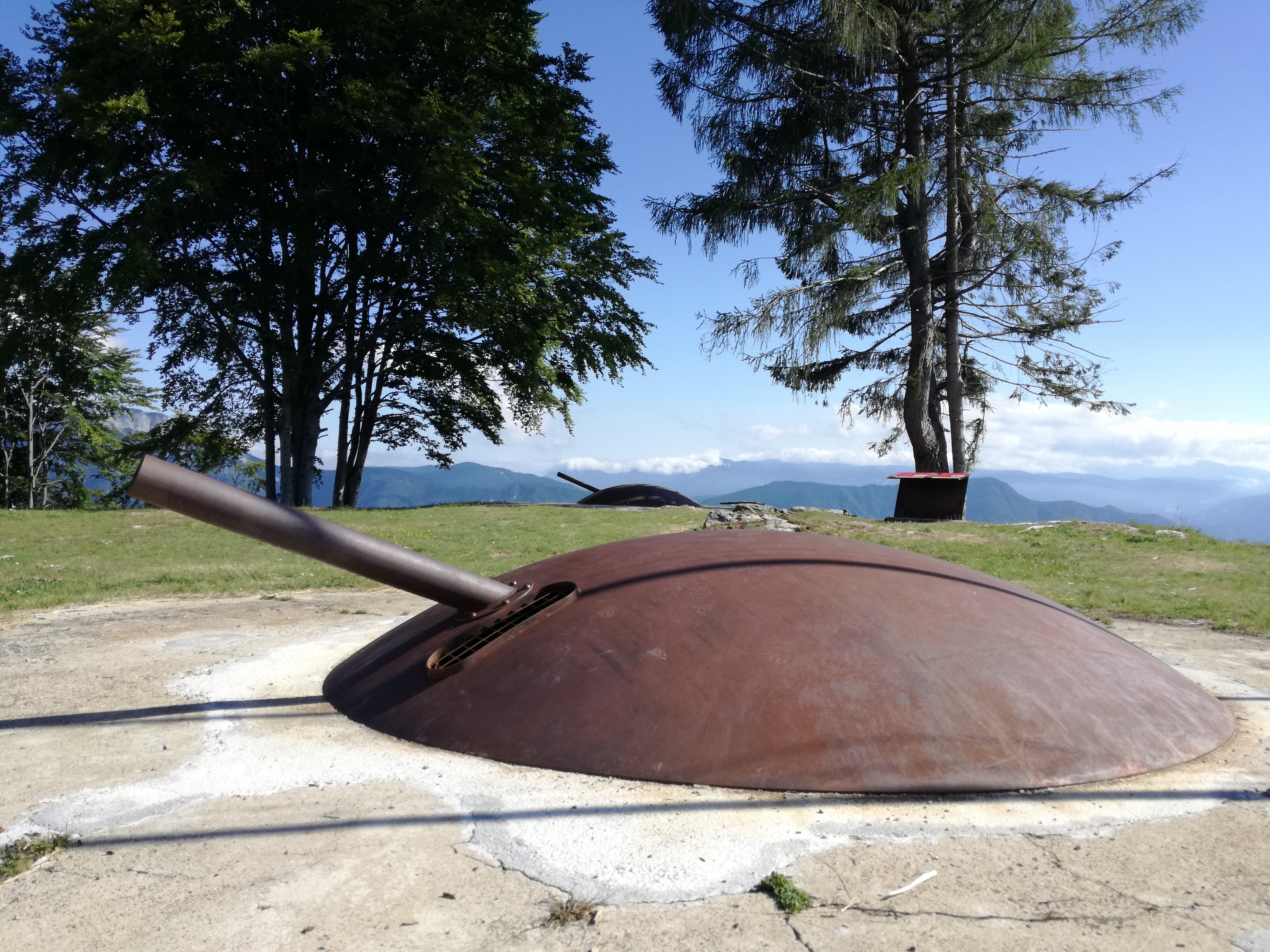 Verdeck Werk Busa Grande